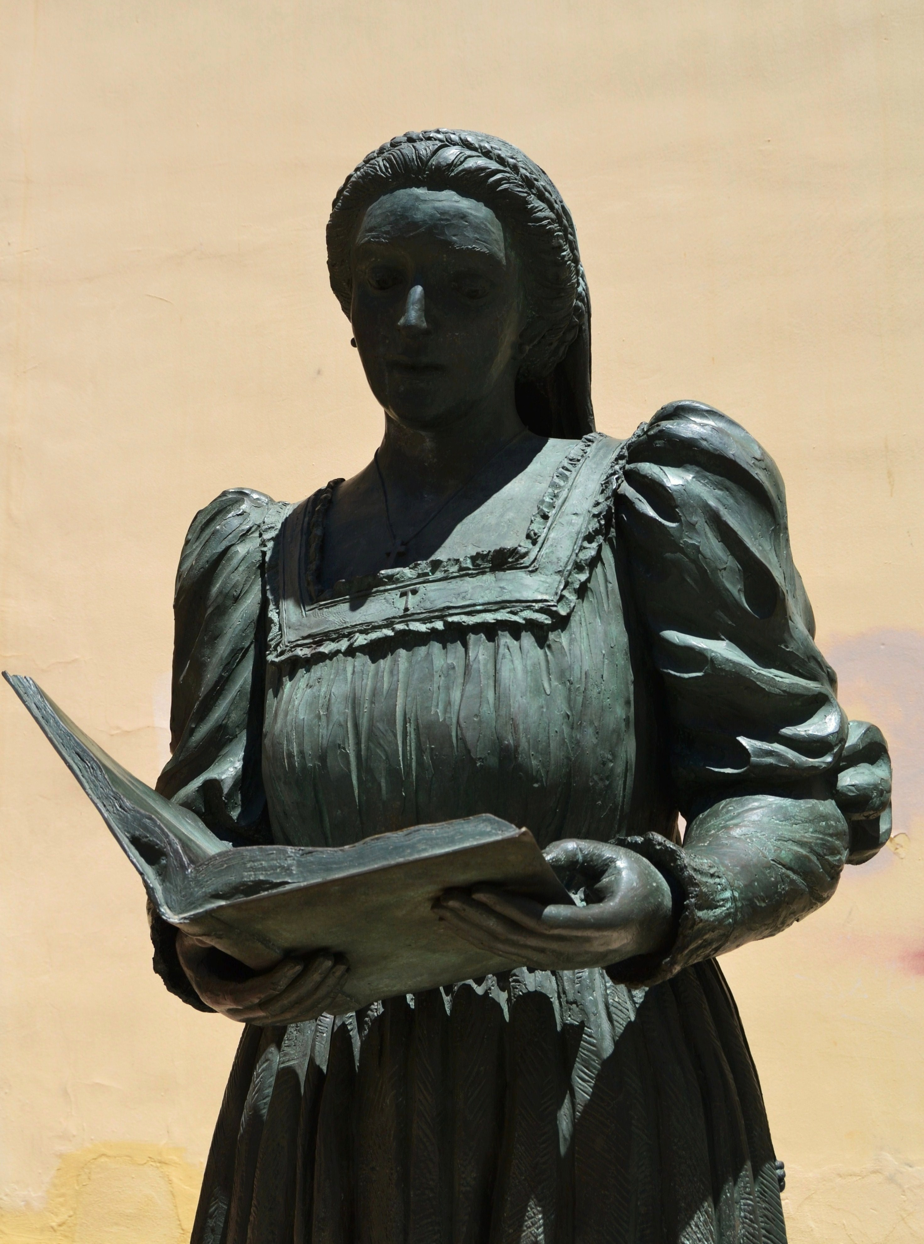 Estàtua de Maria Enríquez (detall) a Gandia.